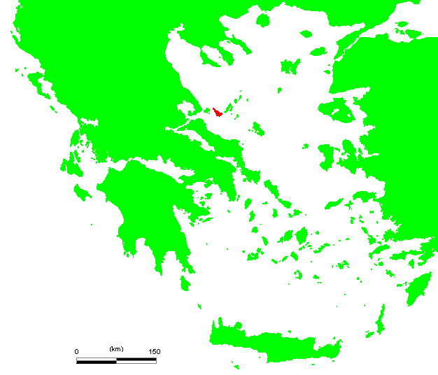 GR Skopelos.PNG (Greek island)